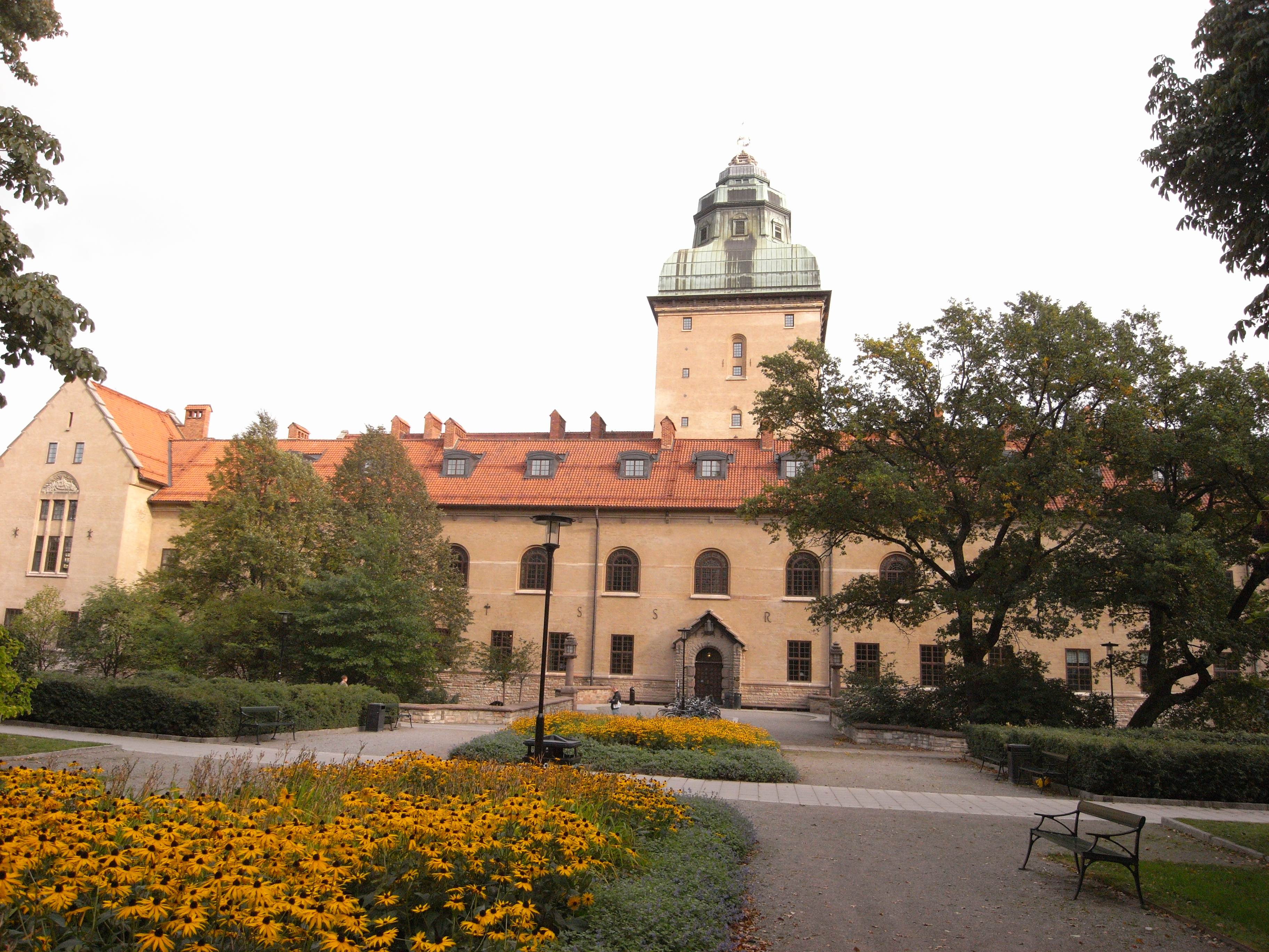 Rådhuset (Fruktkorgen 1)